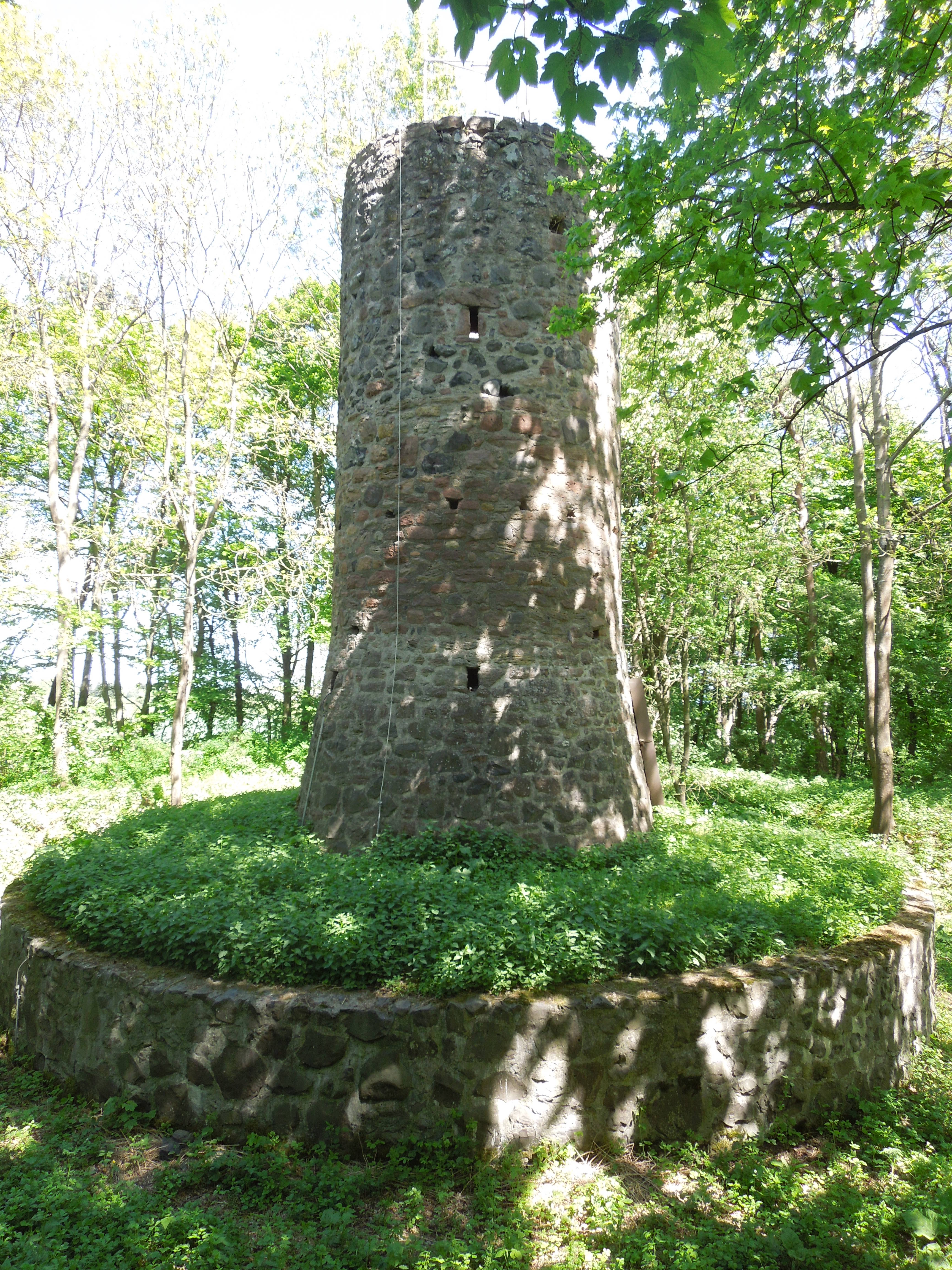 Die Eckerichswarte auf dem Eckerich bei Fritzlar; die Stützmauer am Grabeninneren ist neueren Ursprungs